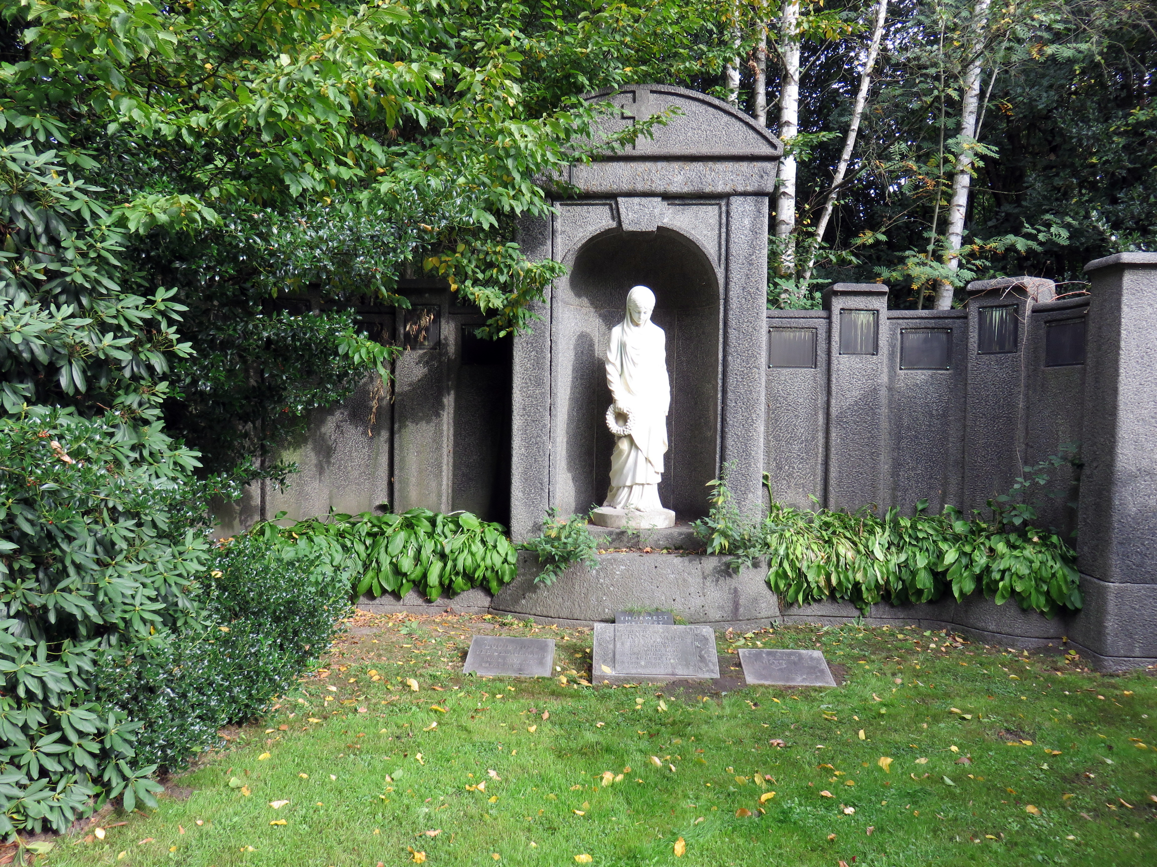 Familiengrab Voss“, Friedhof Ohlsdorf, Planquadrat T 23 (südöstlich Kapelle 2) einschließlich Kissenstein für den Mitbegründer der Hamburger Werft Bohm & Voss Ernst Voss. Das Grabmal wurde 1907 vom deutschen Bildhauer Julius Moser geschaffen.